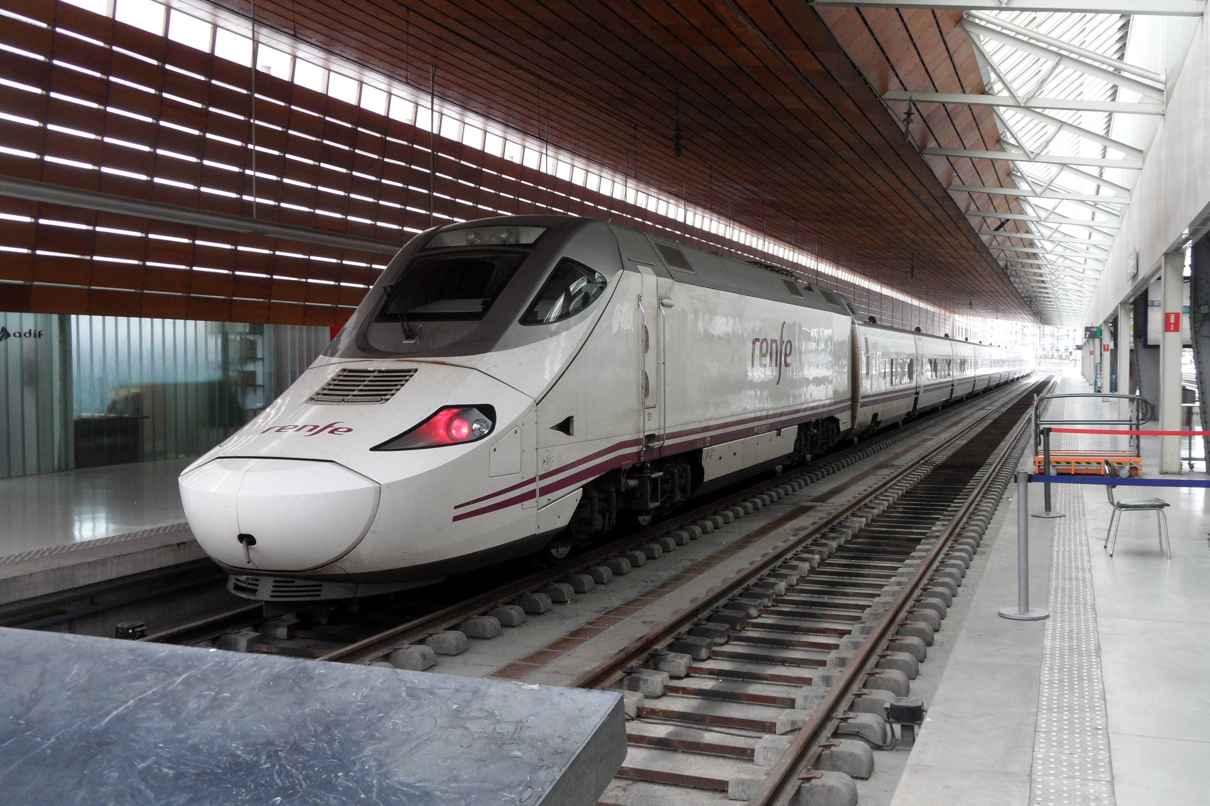 Renfe-Baureihe 130, umspurbarer Triebkopf, gekuppelt mit angepasstem Talgo-7-Wagenzug. Alle Fahrzeuge sind umspurbar, der Kastenquerschnitt von Lok und Wagenzug ist auffällig abweichend, die Ursache ist die sowohl räumlich als auch zeitlich völlig getrennte Entwicklung der Triebfahrzeuge und Wagen. Während die Wagen als Talgo 7 die nächste Entwicklungsstufe des Talgo Pendular sind, für einen klassischen Betrieb mit wechselnden Lokomotiven entworfen und gebaut wurden und schon 2001 im Regelbetrieb verkehrten, sind die Maschinen vom erst 2005 gebauten Prototyp Talgo Travca abgeleitet worden. Eingefahren von Madrid